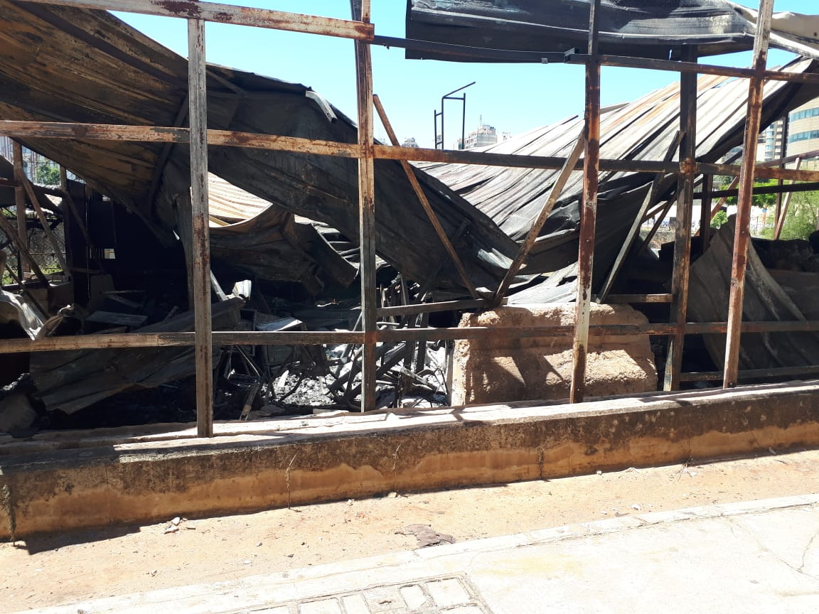 Zerstörungen an Geschäften in der Innenstadt von Beirut nach den erneuten Protesten im Libanon im Juni 2020